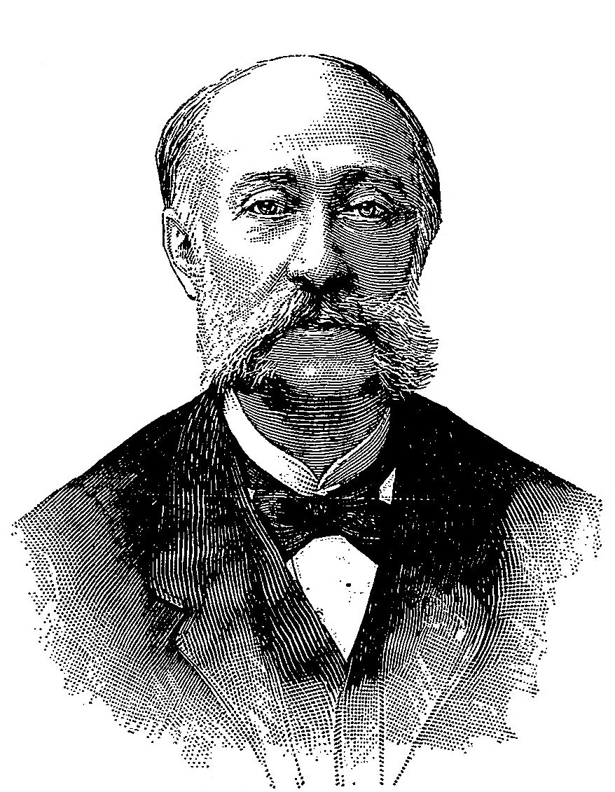 "M. Guillaume Guizot (portrait communiqué par la famille)".